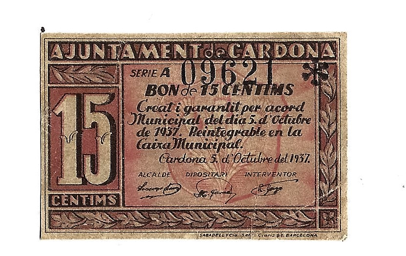 Anvers del bitllet de 15 cèntims de pesseta realitzat a Cardona durant la Guerra Civil Espanyola. Moneda republicana.